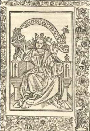 Reprodução de uma xilogravura da edição de 1514 das Ordenações Manuelinas, impressa por João Pedro Buonhomini nas instalações de Valentim Fernandes, em Lisboa.